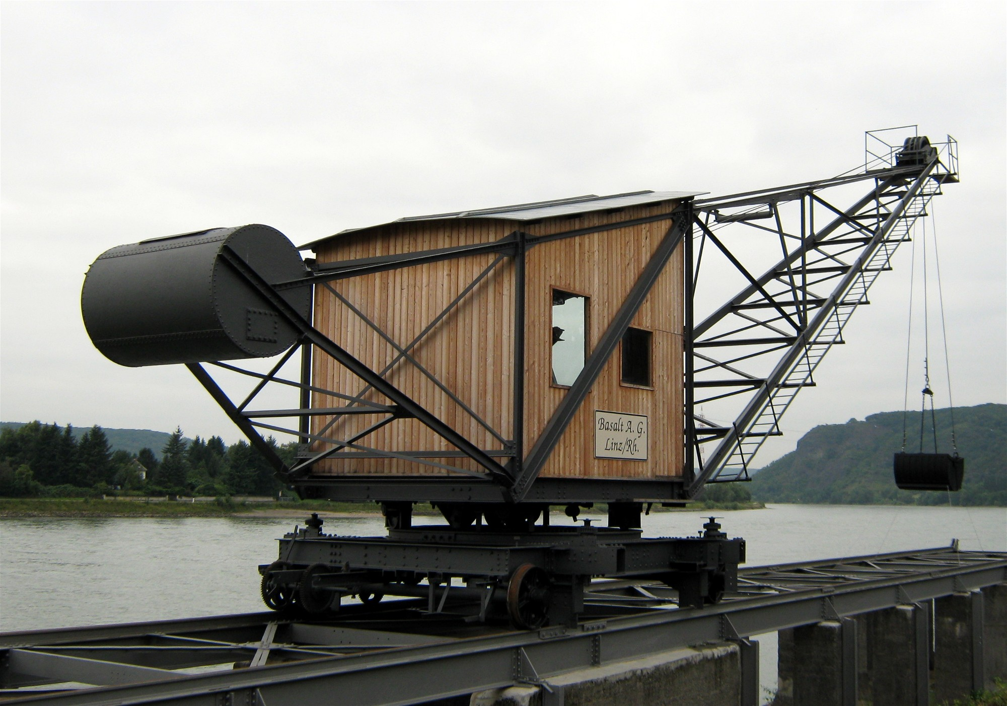 historischer Bagger der Basalt AG in Linz am Rhein am Ufer vor dem Verwaltungsgebäude